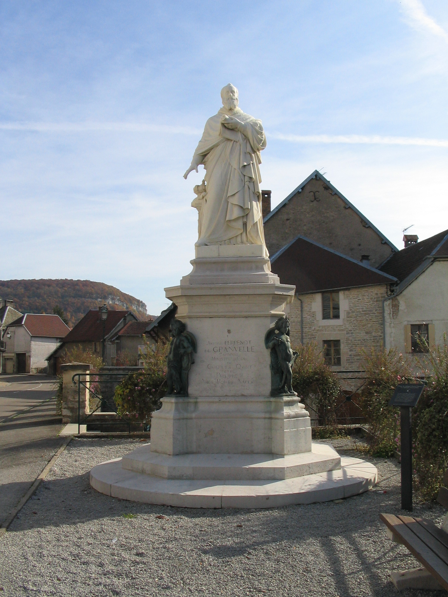 Statue du cardinal Antoine Perrenot de Granvelle (1517-1586) à Ornans (Doubs/France). Réalisée en marbre par le sculpteur bisontin Jean Petit en 1897. Don de Charles Weiss (bibliothécaire)